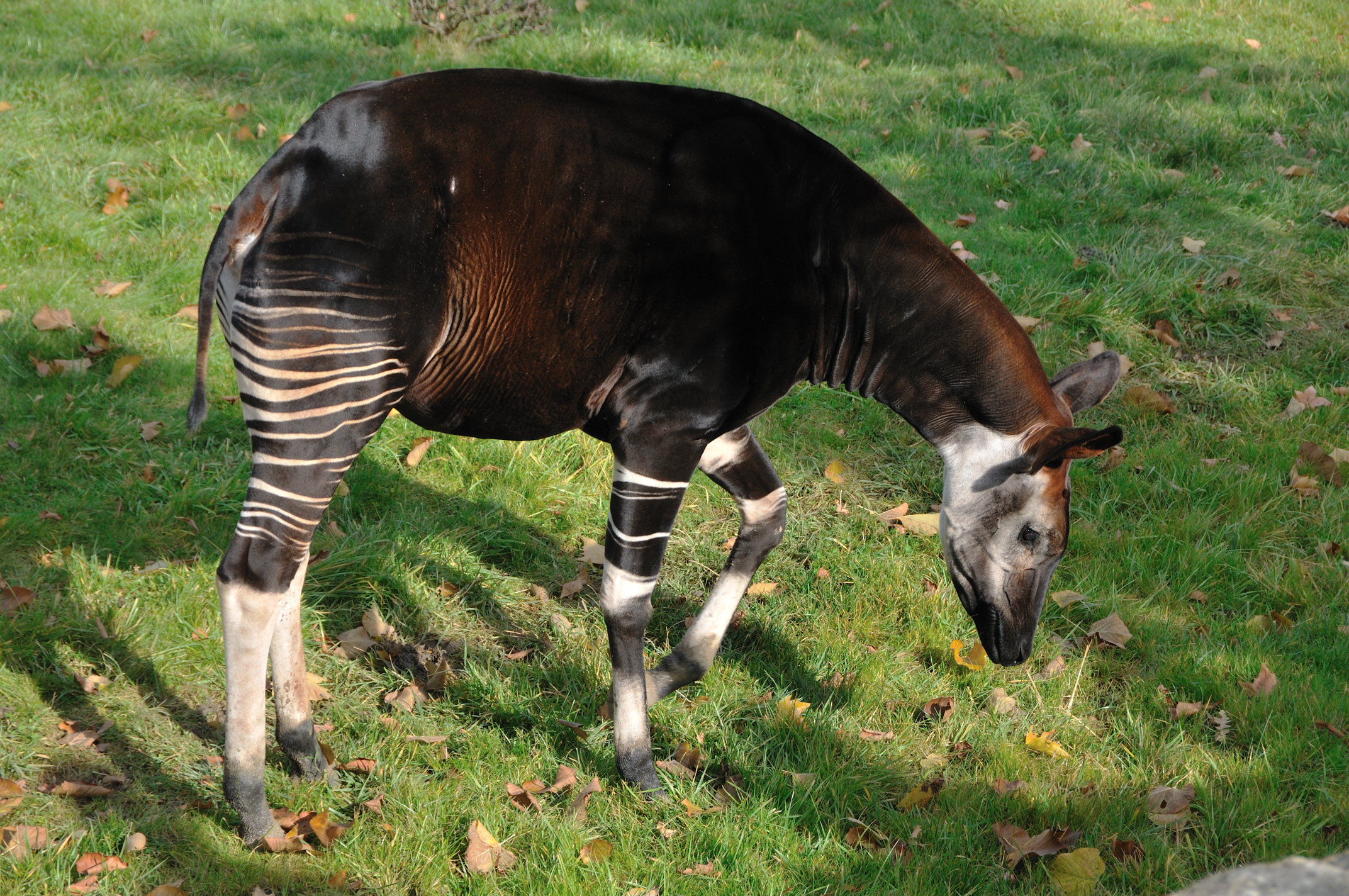 ZooParc de Beauval, Saint-Aignan, Loir-et-Cher, France Okapi (Okapia johnstoni)